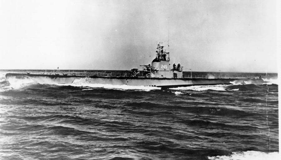 L'USS Cobia.